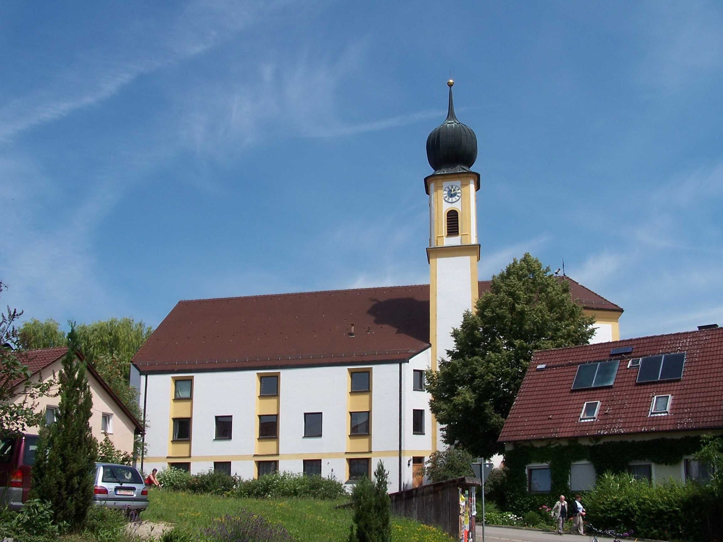 Wiesent, Kirchweg 4. Kath. Pfarrkirche Mariä Himmelfahrt, polygonaler Chor mit Flankenturm mit Zwiebelhaube und Pilastergliederung, 1707 (Langhaus 1970); mit Ausstattung; Reste der Friedhofsmauer, Granitbruchstein, Anfang 18. Jh; 31 Schmiedeisenkreuze um die Kirche, 17./18. Jh.